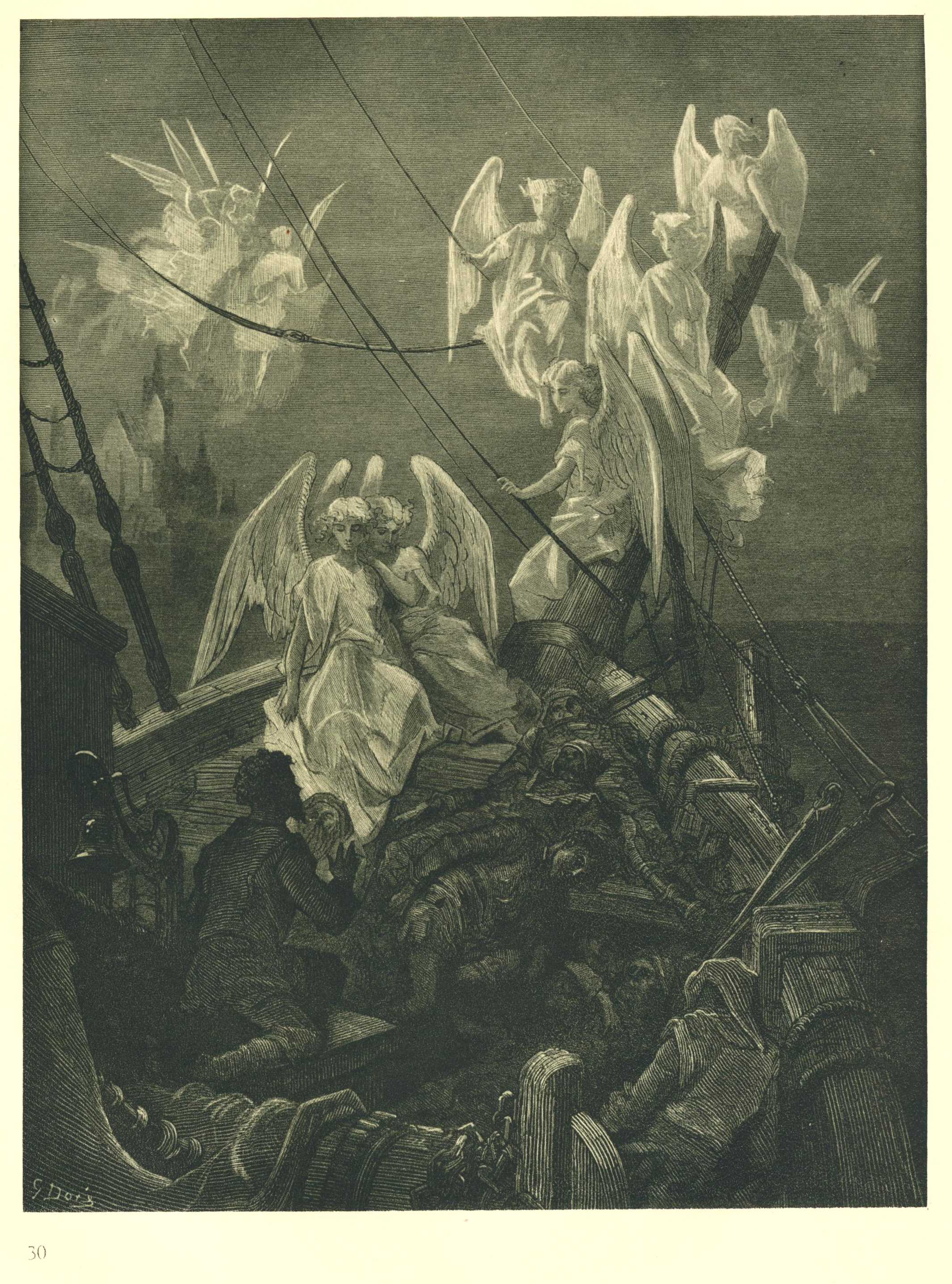 Am Boden flach lag jeder Leib – helleuchtend standen Seraphim (Beschreibung lt. Quelle)